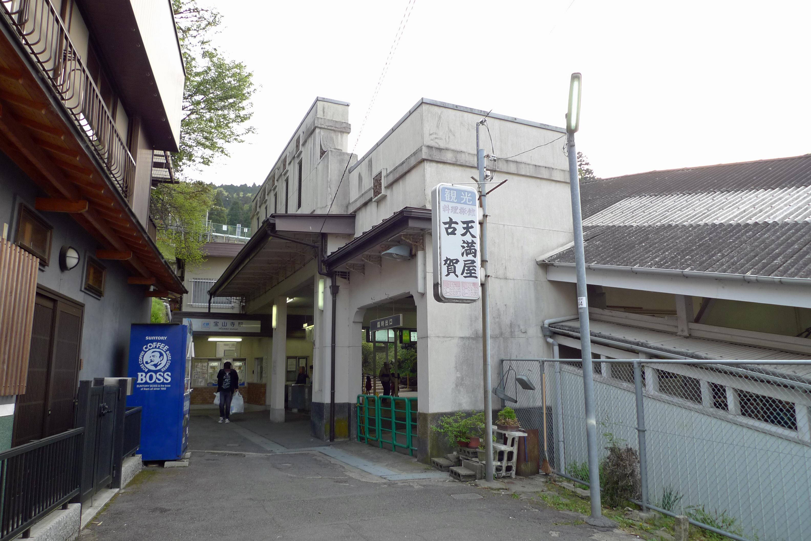 宝山寺駅駅舎